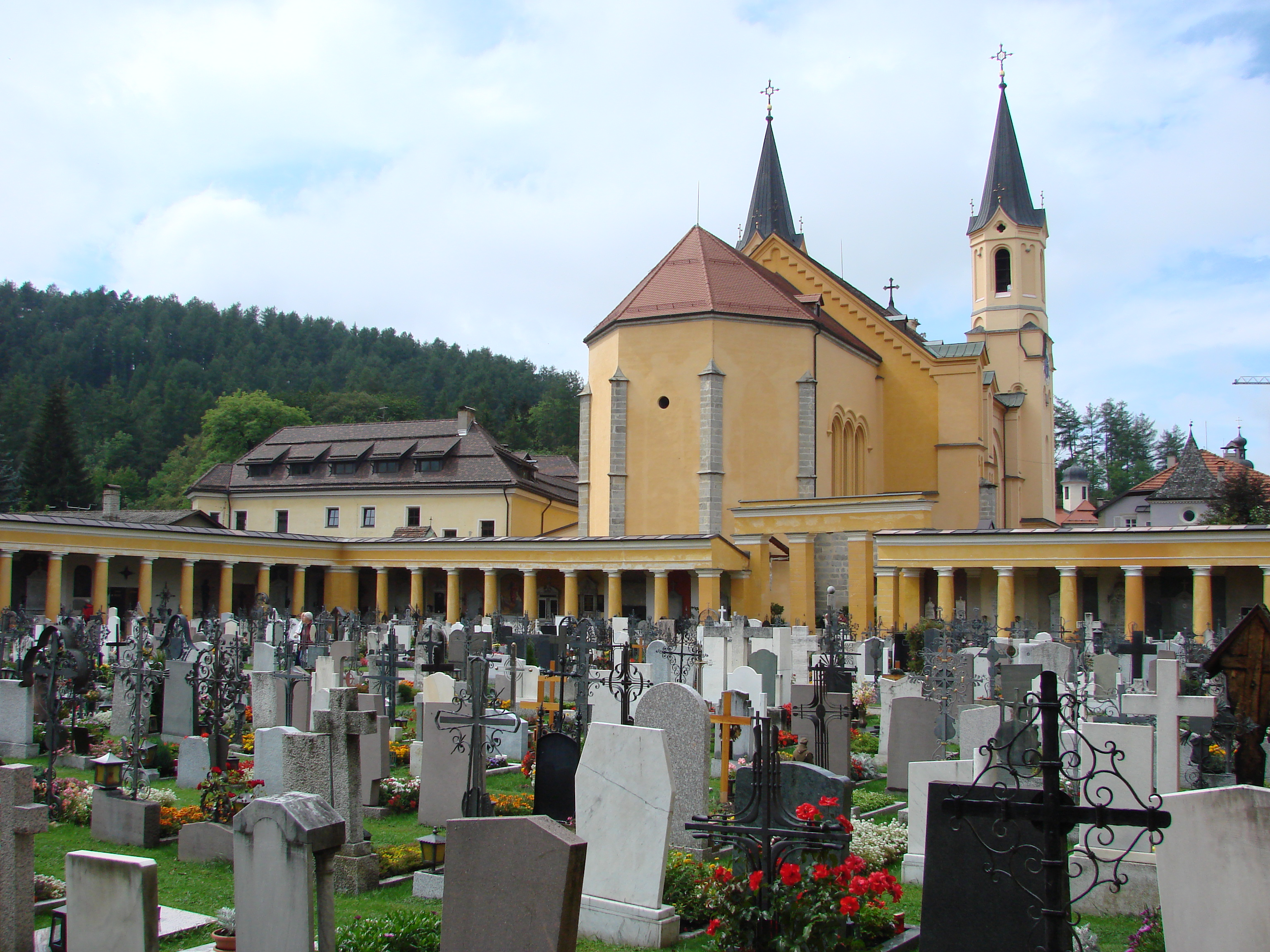 Unsere Liebe Frau in Bruneck mit Friedhof